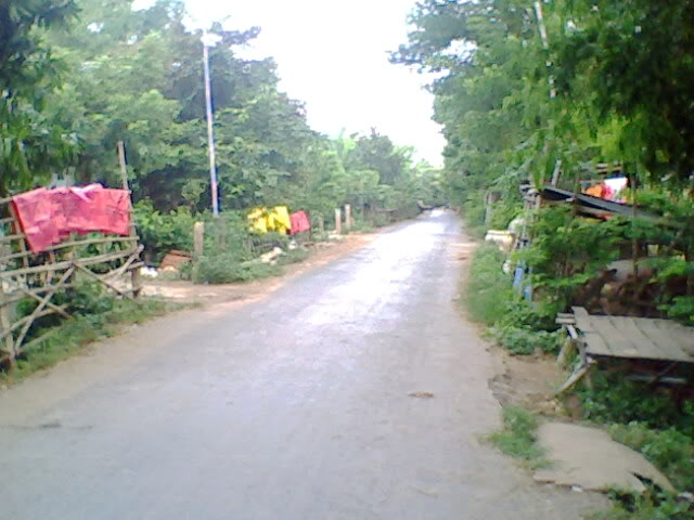 Một con đường nông thôn ở xã Phú Hữu huyện An Phú.